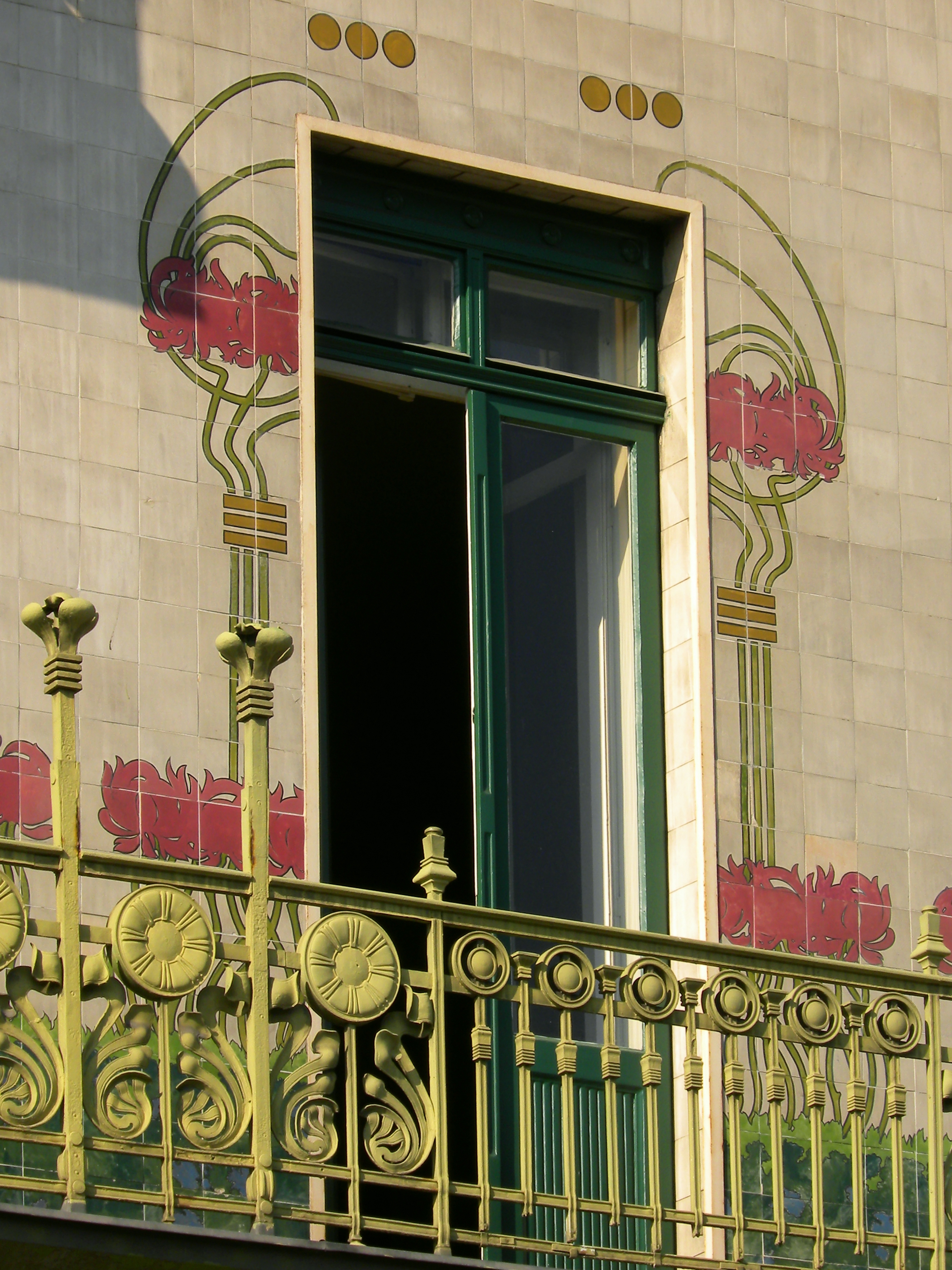 Wohn- und Geschäftshaus, Majolika-Haus